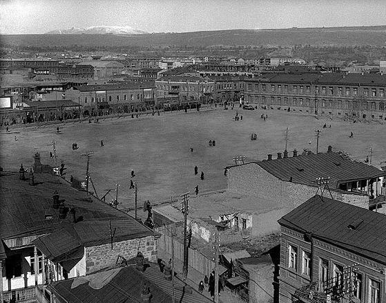 Երևանի հրապարակը 20րդ դ. սկզբին Square of Yerevan in the beginning of 20th century